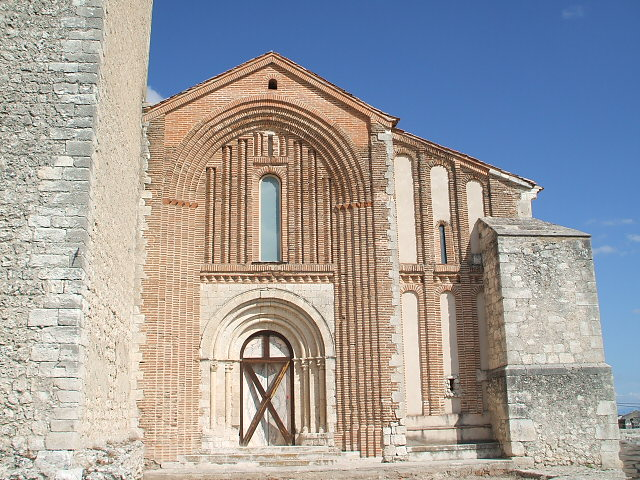 Iglesia de San Andrés de Cuéllar